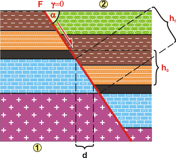 Нормальний скид і його структурні елементи: 1 - лежаче крило, 2 - висяче крило, F - площина зміщувача, h0 - істинна амплітуда скиду, hf - амплітуда по зміщувачу, альфа - кут падіння зміщувача, гамма - кут падіння пластів, d - зіяння пласта